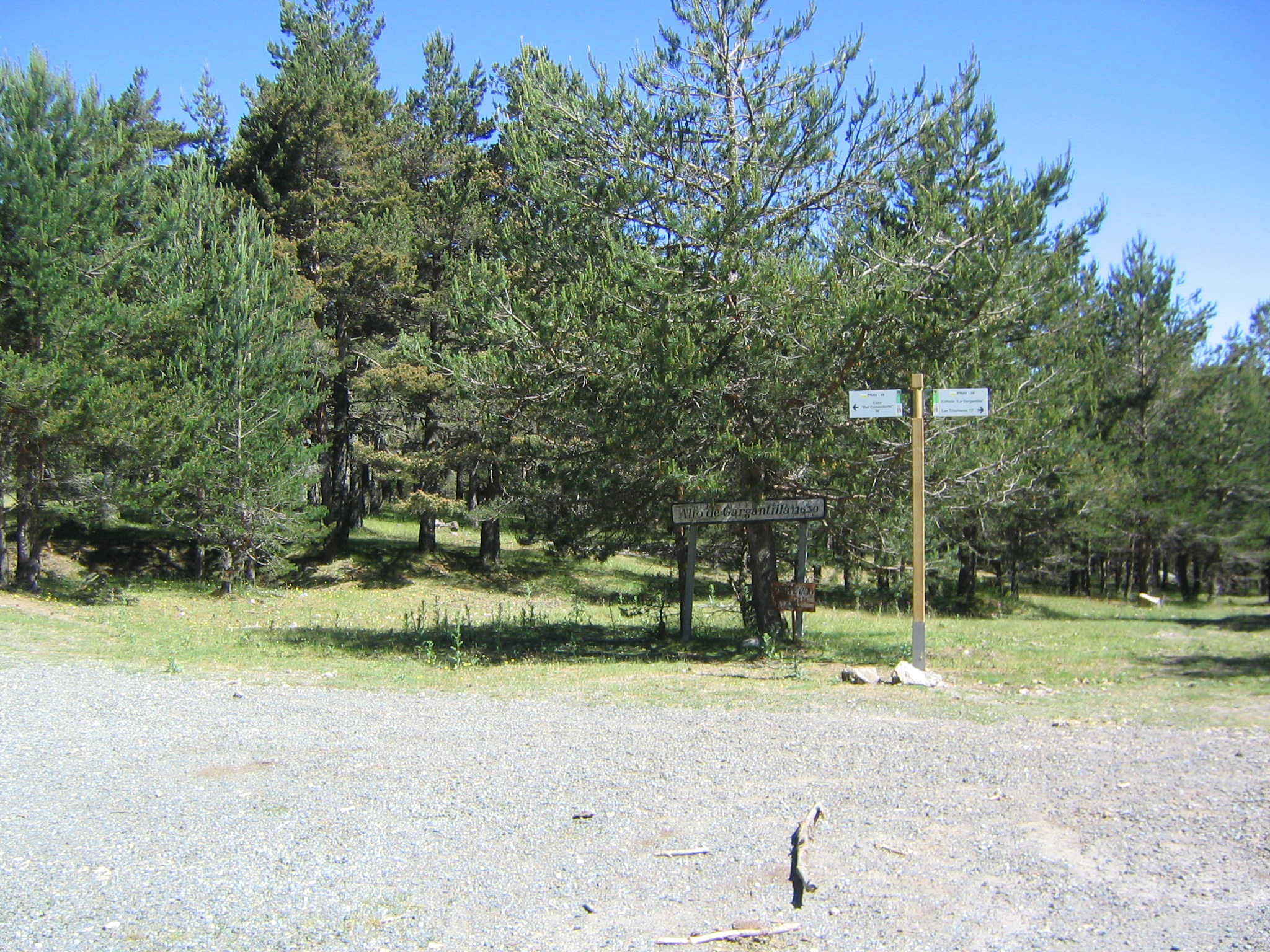 Collado de Gargantilla Cueva Valiente. El Espinar, Segovia, España.